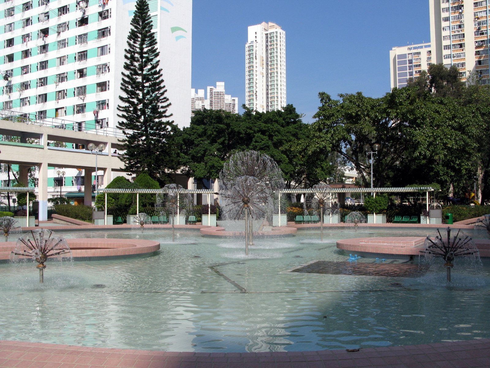 Lek Yuen Estate Fountain 瀝源邨噴水池